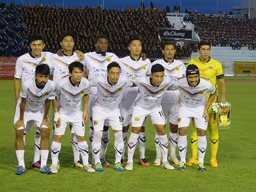 Ang Thong FC